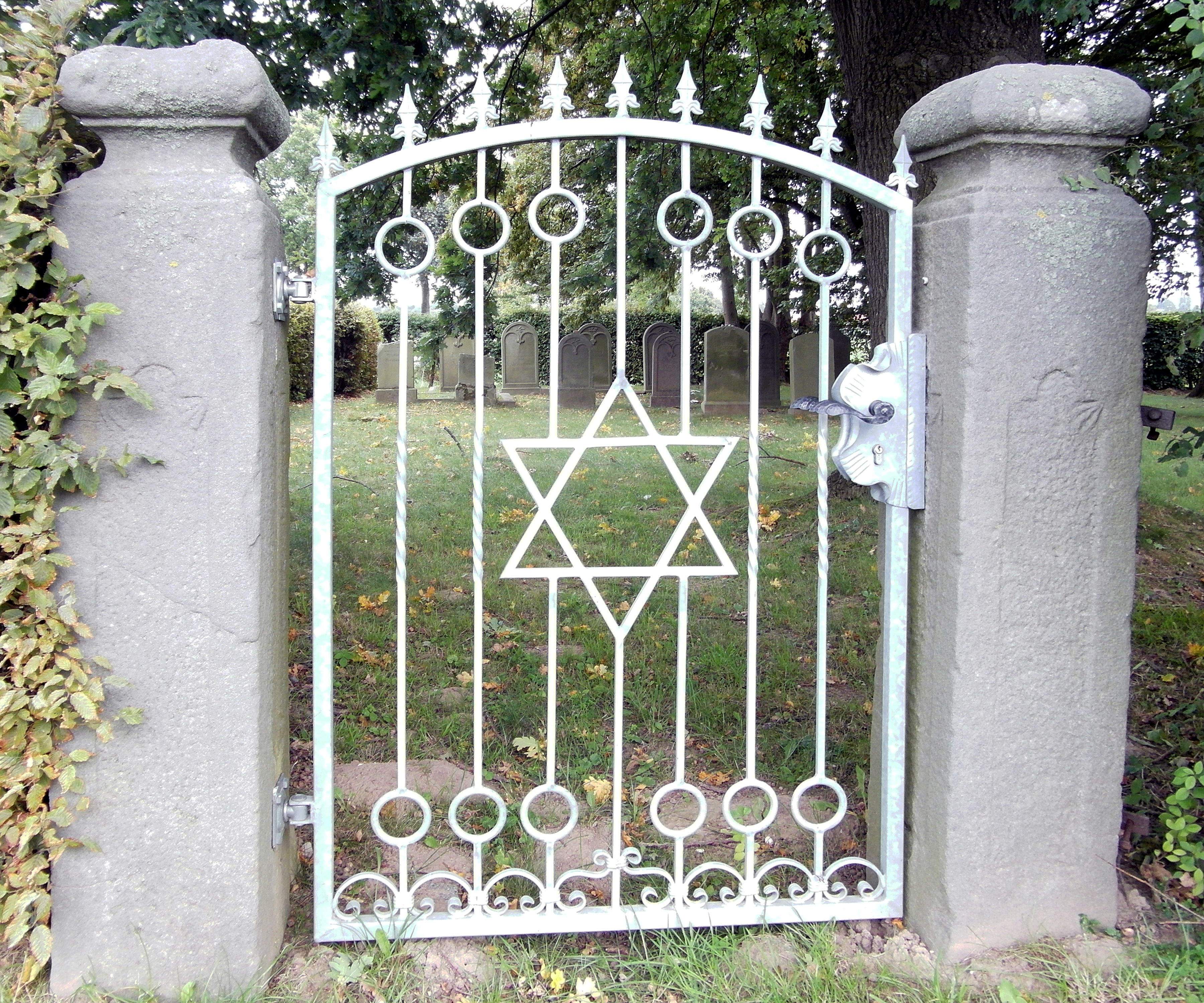 Tor zum Jüdischen Friedhof Gestorf. Der Friedhof liegt außerhalb der Ortschaft an der Straße nach Völksen. Die erste Belegung des Friedhofes fand im Jahre 1783 statt.